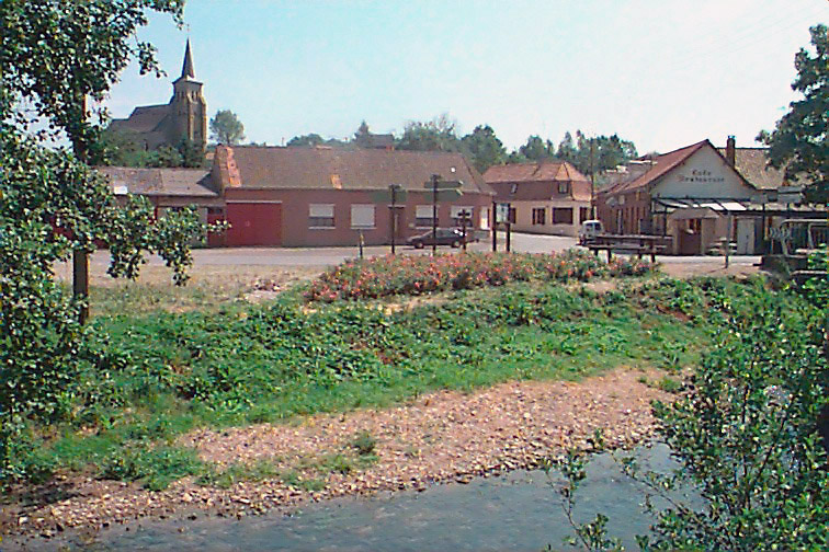 la lys passe à matringhen